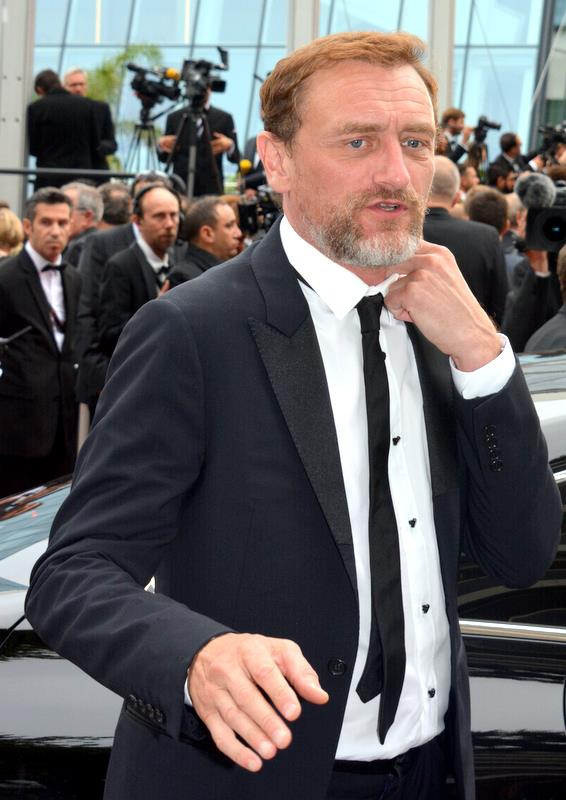 Jean-Paul Rouve au festival de Cannes